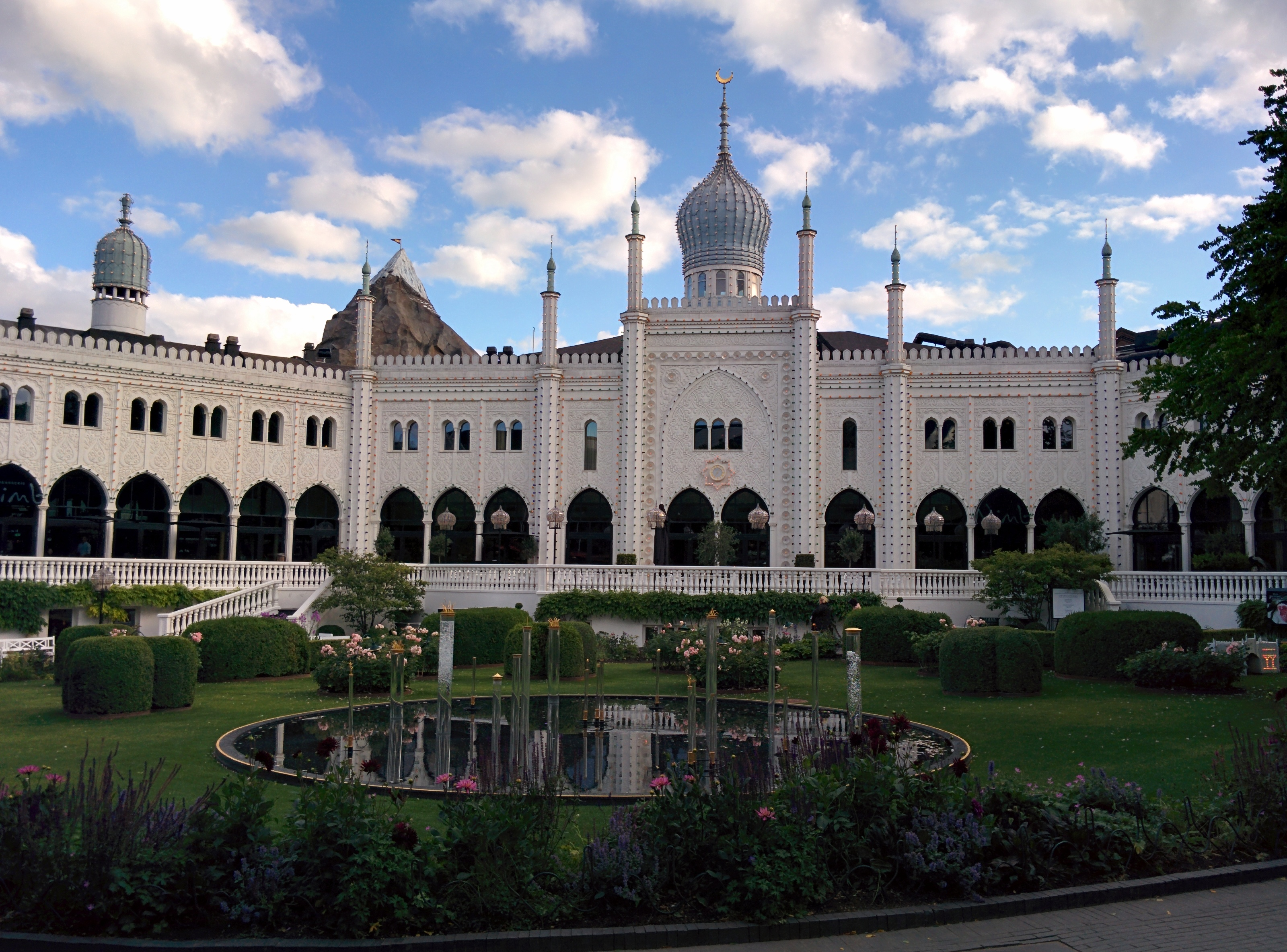 The Nimb in Tivoli Gardens, Copenhagen, Denmark i Gardens